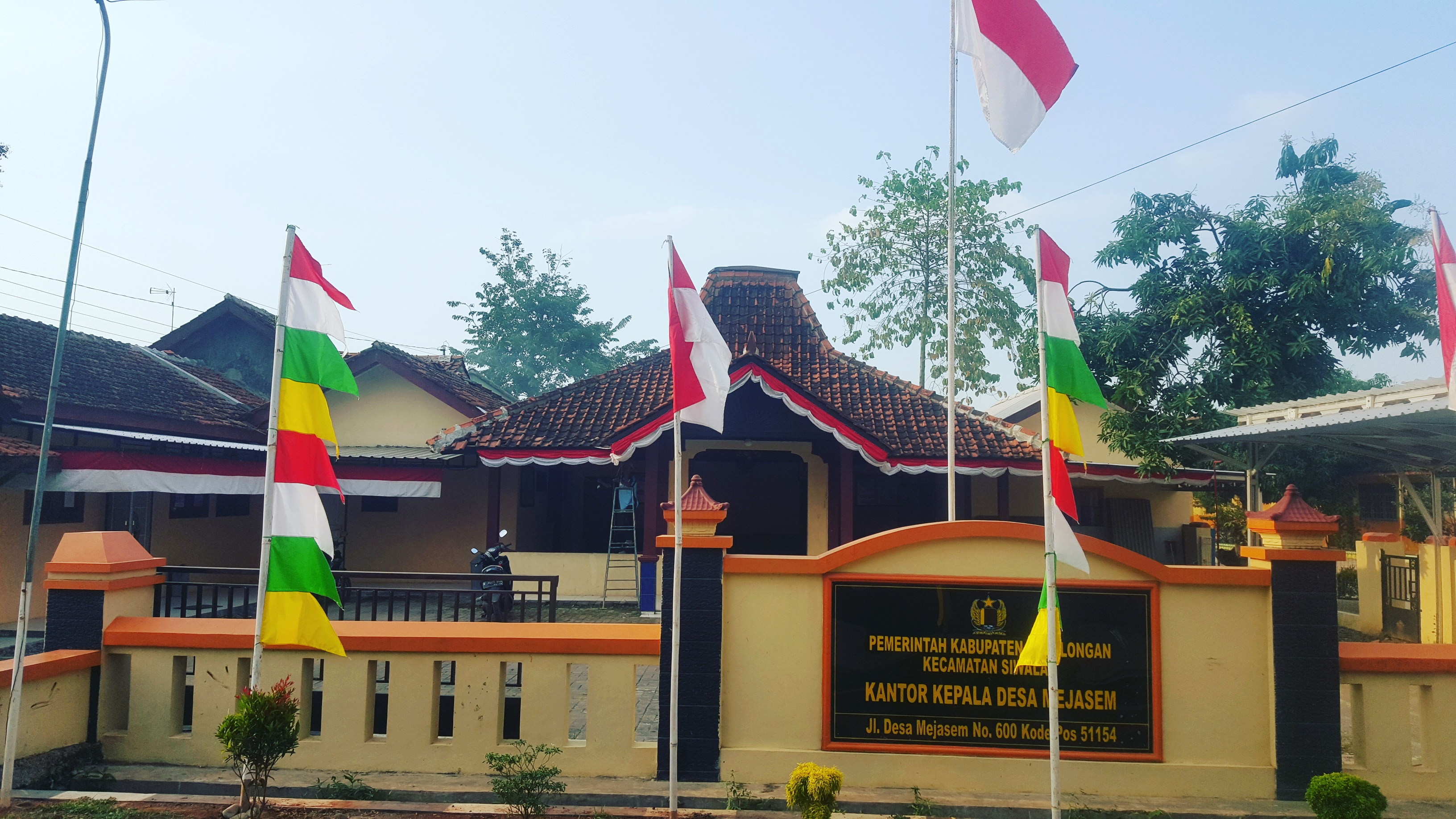 Balai Desa Mejasem